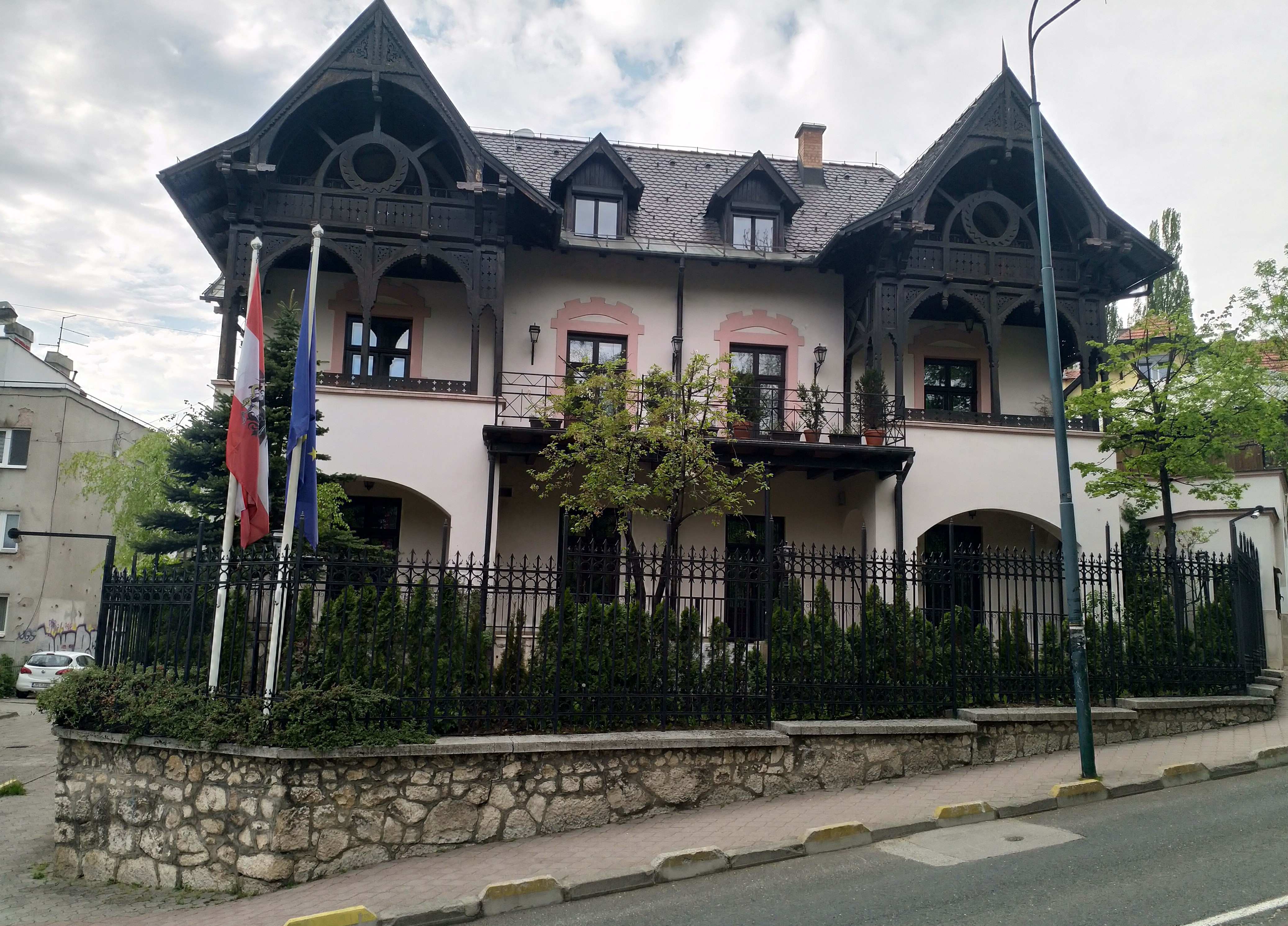 Austrijska Ambasada Sarajevo